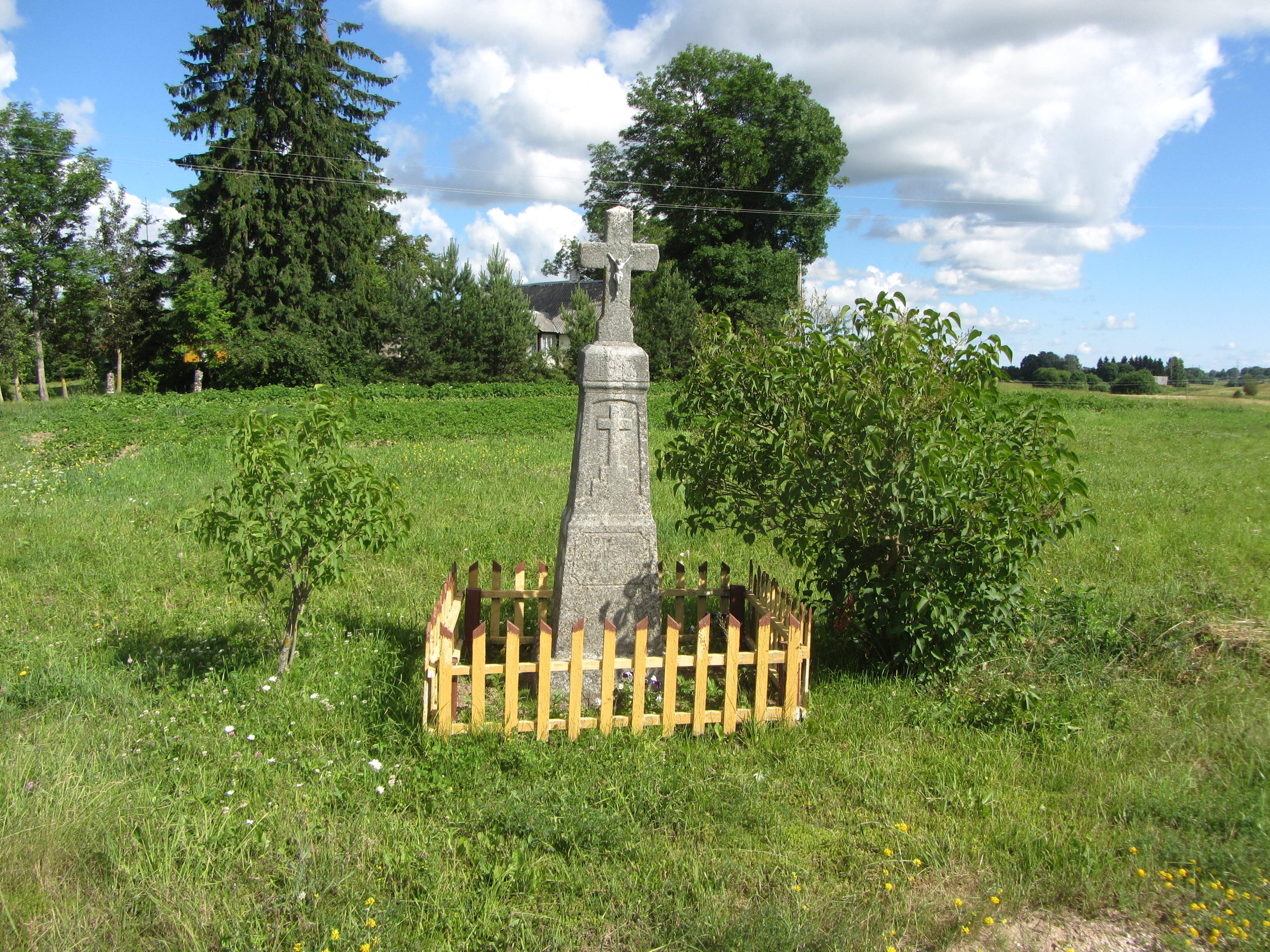 Medeniai, Lithuania